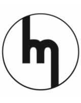 1960 Mazda badge